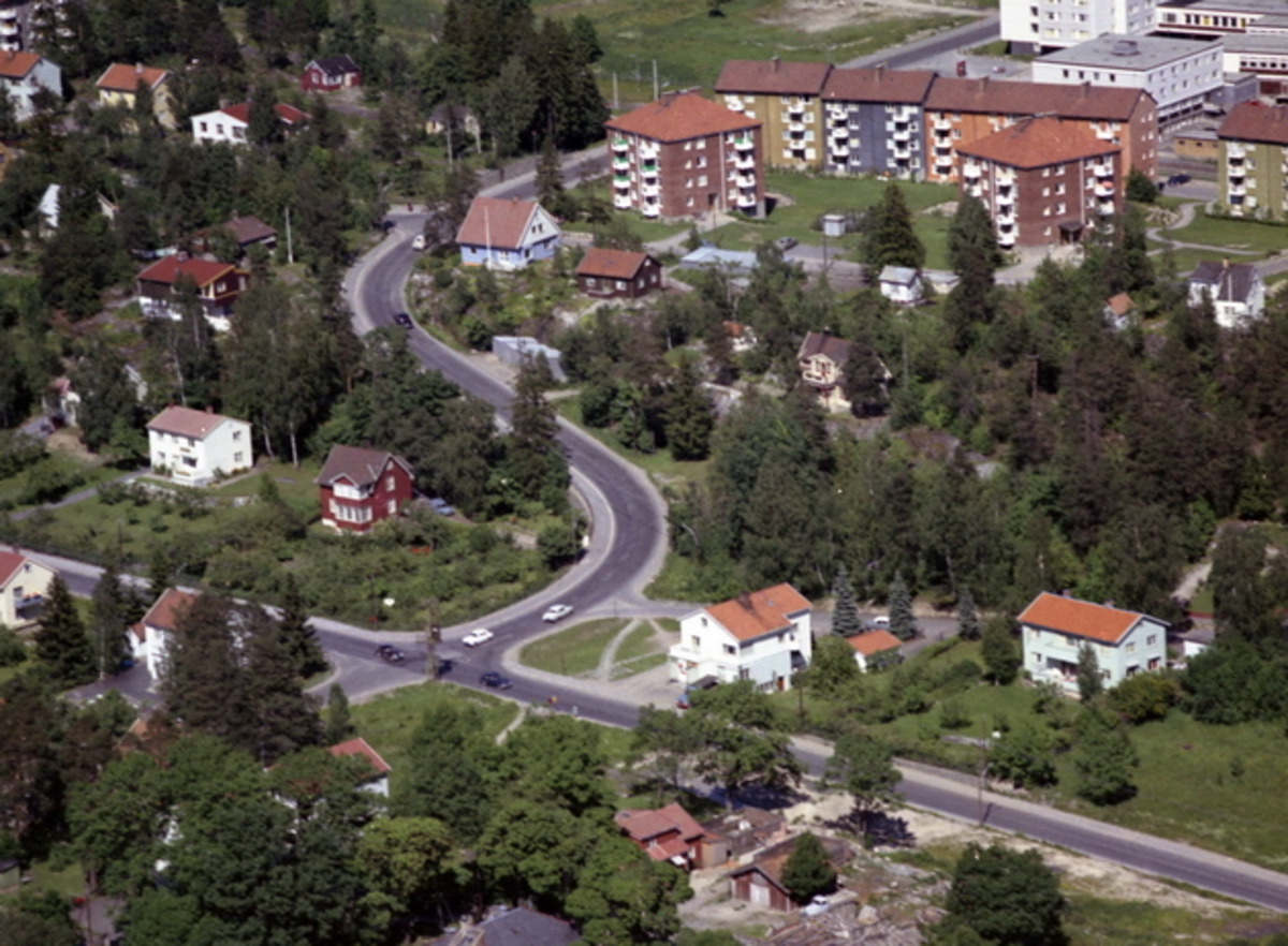 Lambertseterveien der den svinger seg opp fra Oberst Rodes vei i forgrunnen til Radarveien og Lambertseter senter i bakgrunnen